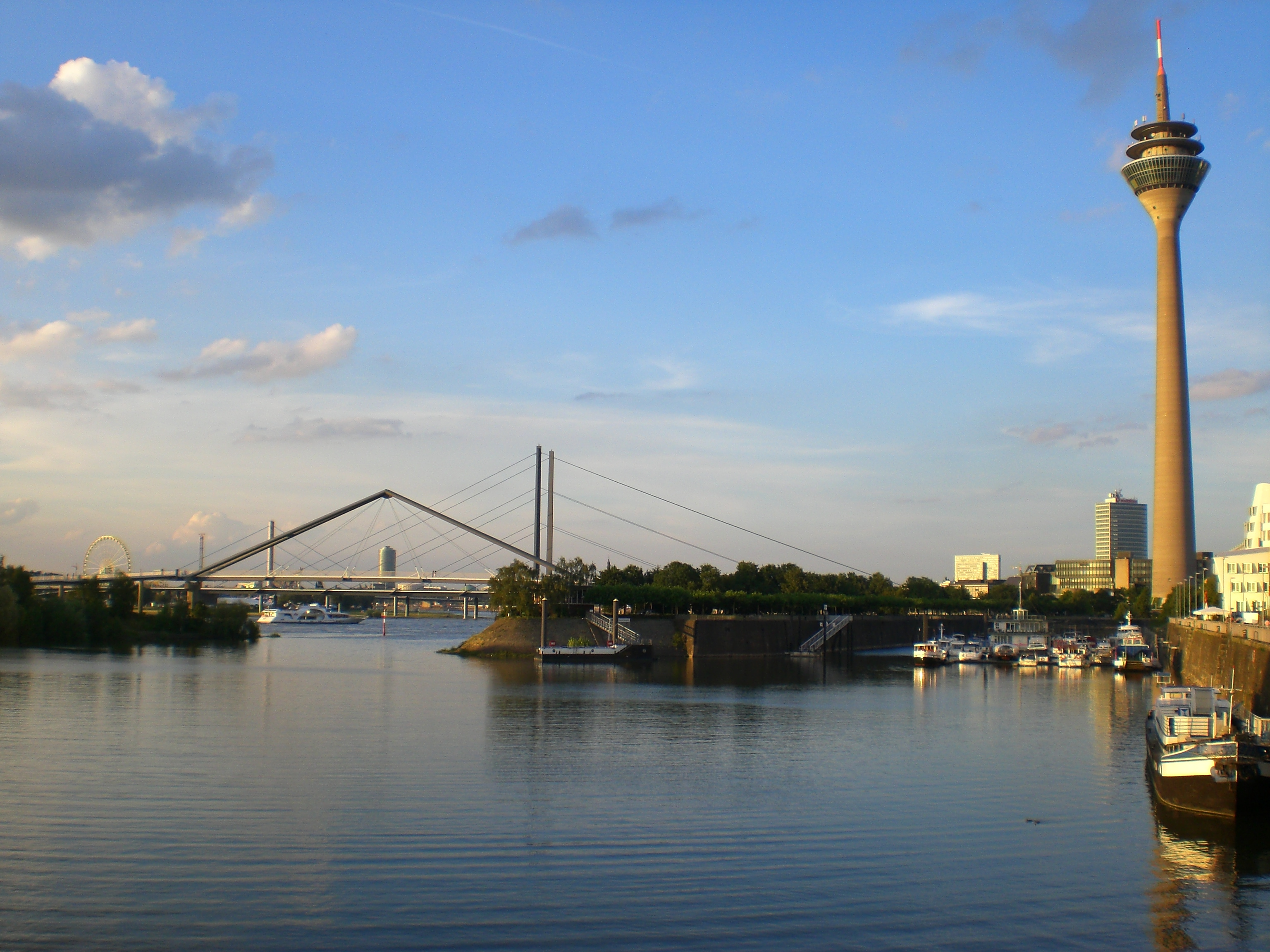 Medienhafen Düsseldorf